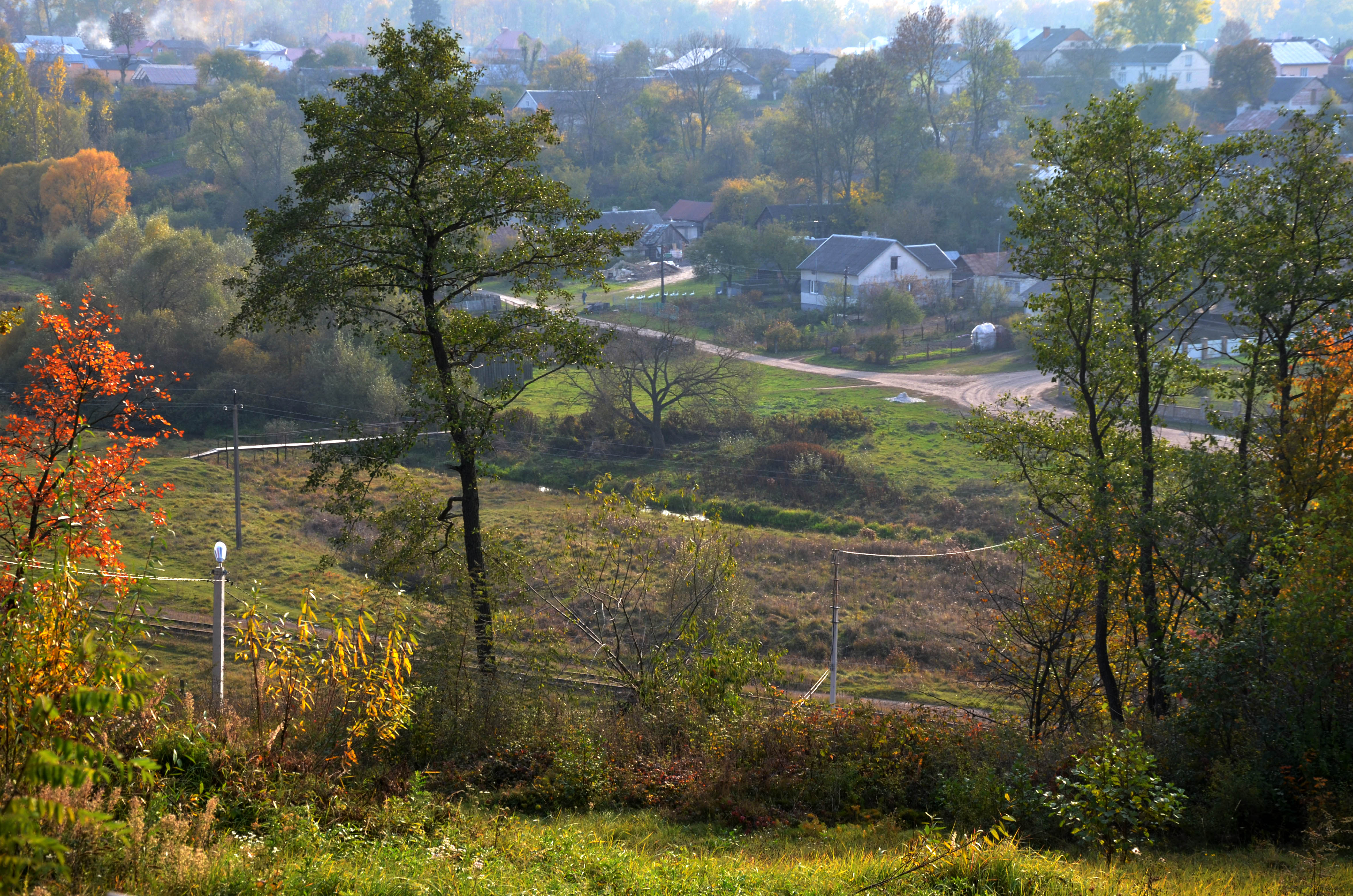 Село Домажир Яворівського району.